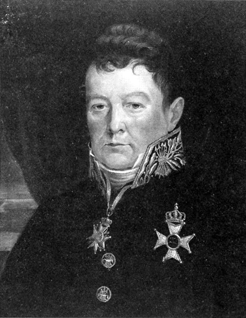 Benoit Holvoet